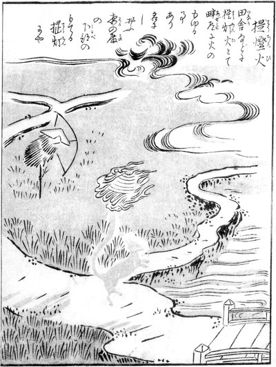 Chōchinbi (提灯火) from the Konjaku Gazu Zoku Hyakki (今昔画図続百鬼)